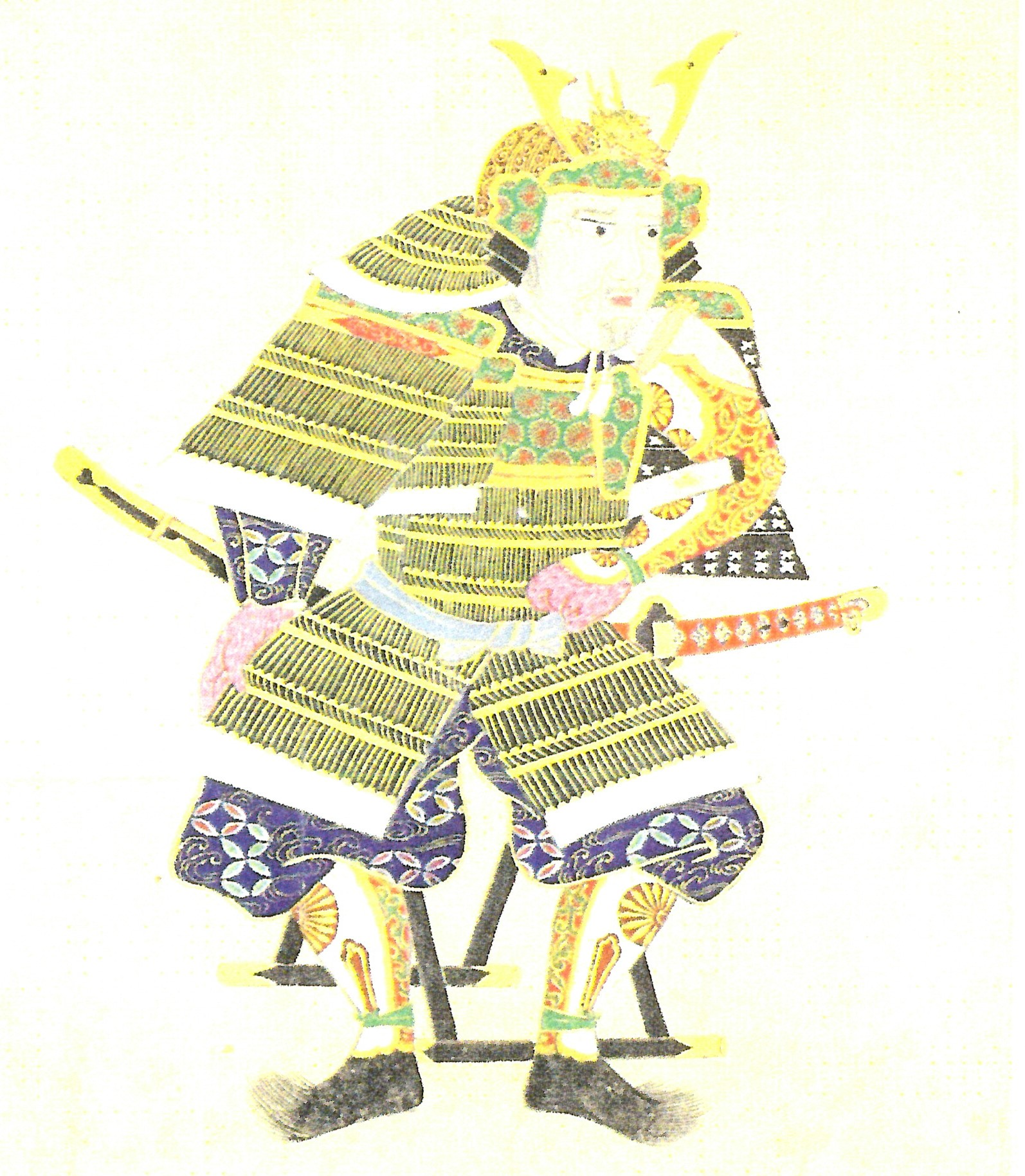 南部信時の肖像。